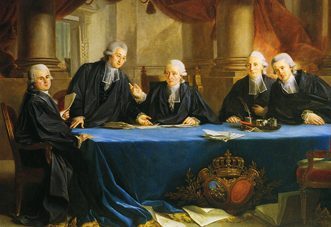 Les juges et consuls de la Bourse de Bordeaux de l’année 1786 : Pierre Loriague, Jacques Bruno Lafite-Dupont, Mr. Mercie, Antoine Journu de Saint-Magne, Hugues Vignes